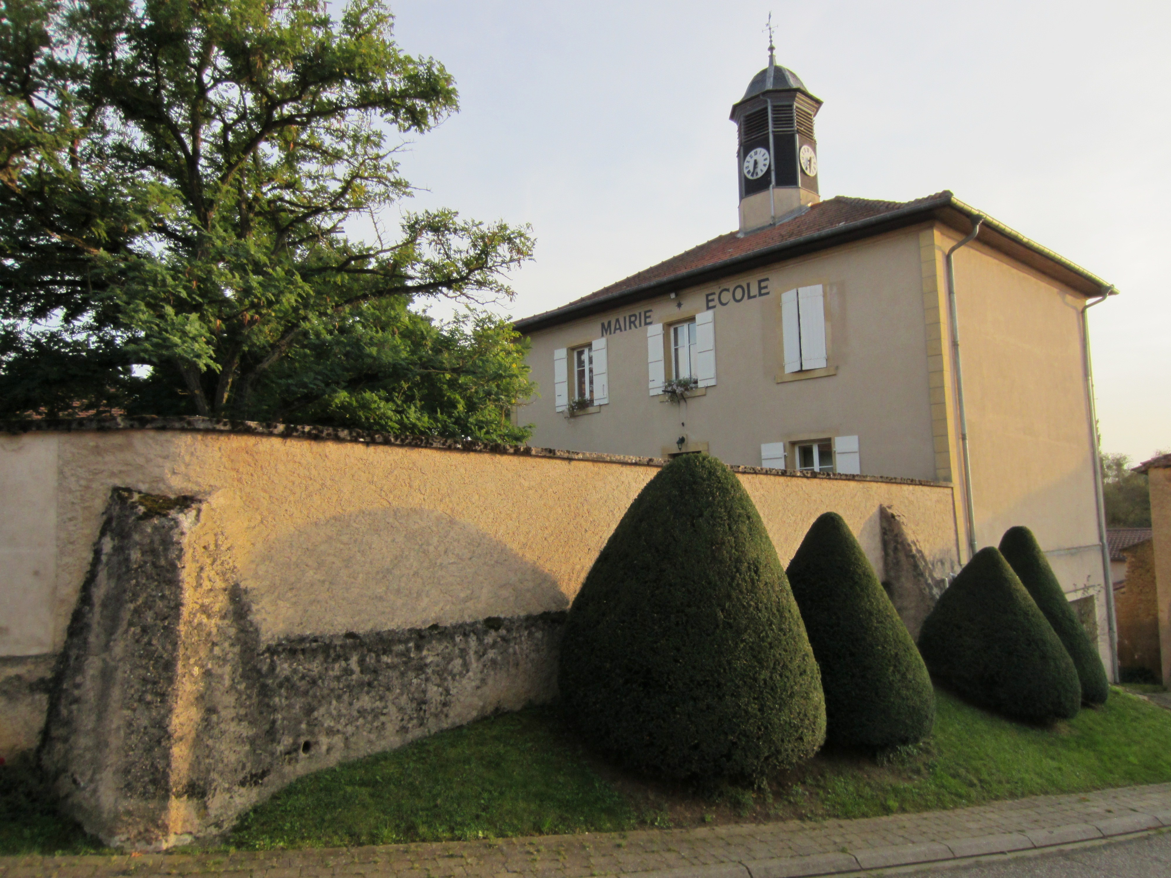 Description mairie-école Ville Yron mairie-école Ville Yron